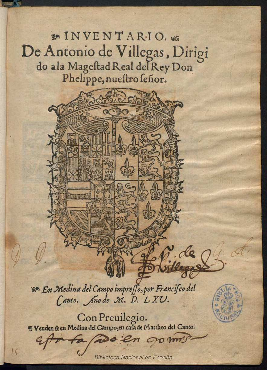 Título: Inventario, de Antonio de Villegas, dirigido a la Magestad Real del Rey Don Phelippe, nuestro señor Autor: Villegas, Antonio de (fl. 1551-1577), Canto, Francisco del (fl. 1551-1590) - impresor, Canto, Mateo del (fl. 1554-1568) - editor Fecha: 1565 Datos de edición: En Medina del Campo, impresso por Francisco del Canto